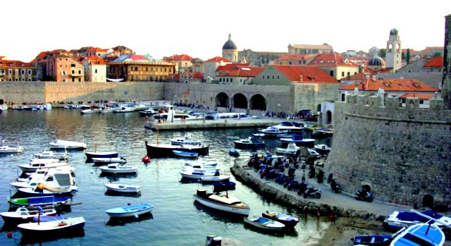 Дубровник, стари део града